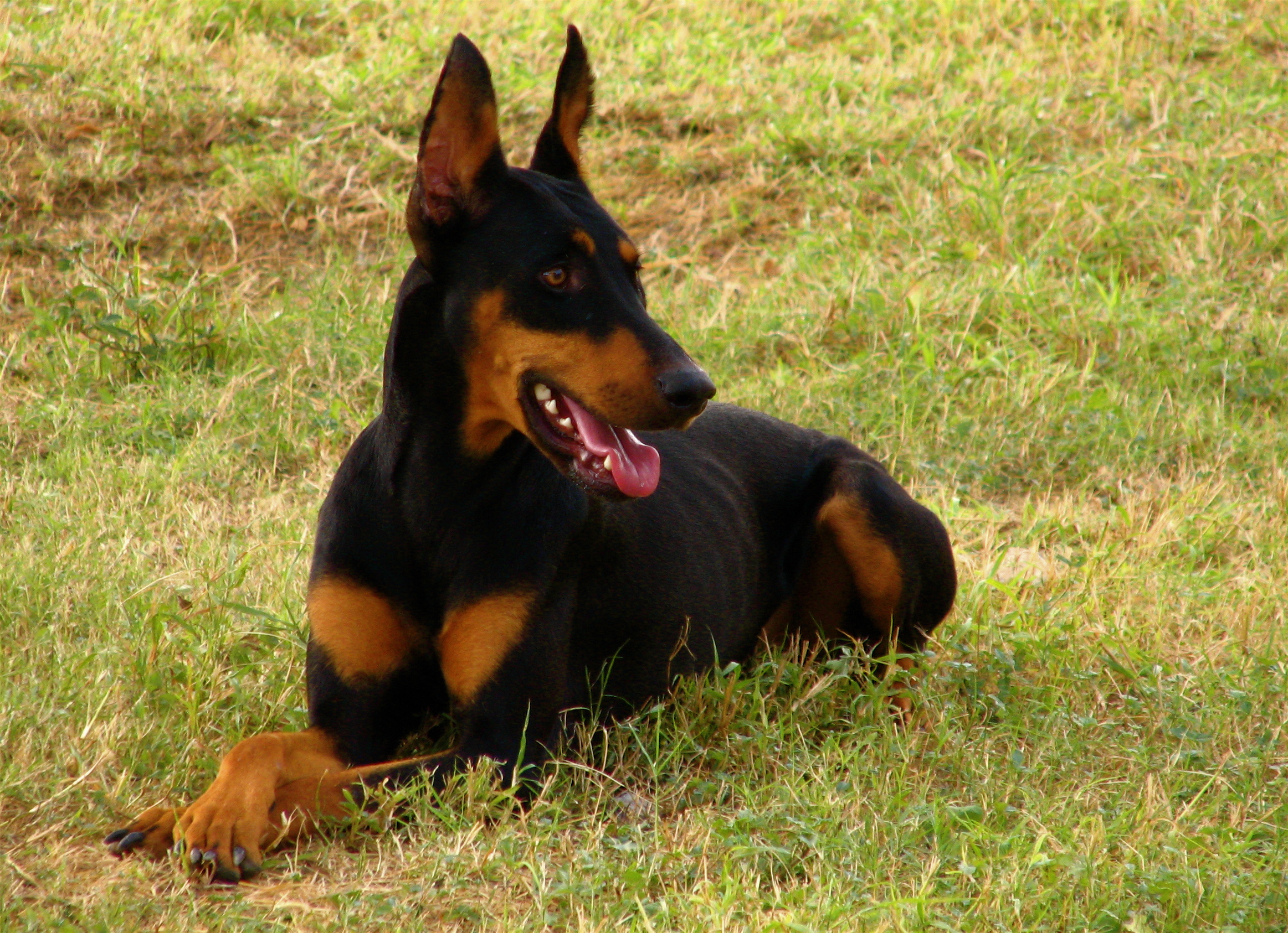 A female Doberman Pinscher.